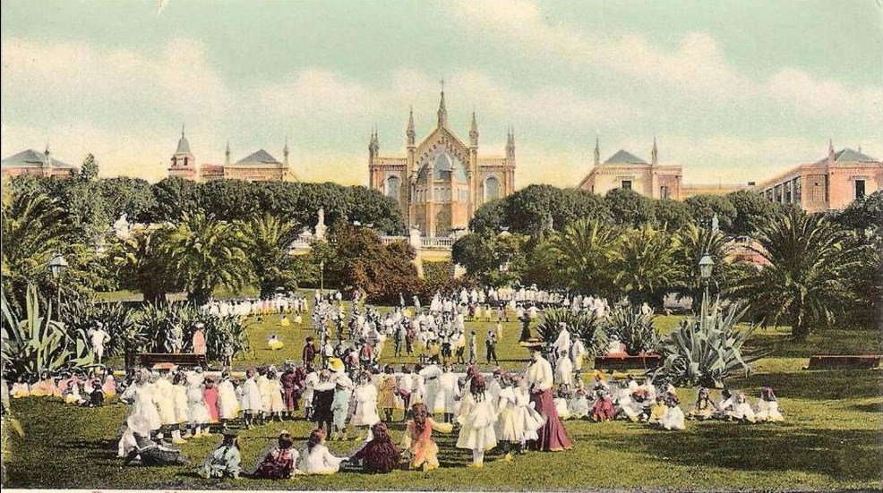 Un jardín de infantes juega en el Paseo de la Recoleta, hoy Plaza Intendente Alvear y mejor conocida como Plaza Francia, en Buenos Aires. Al fondo, los edificios y la capilla del Asilo de Ancianos, hoy Centro Cultural Recoleta.